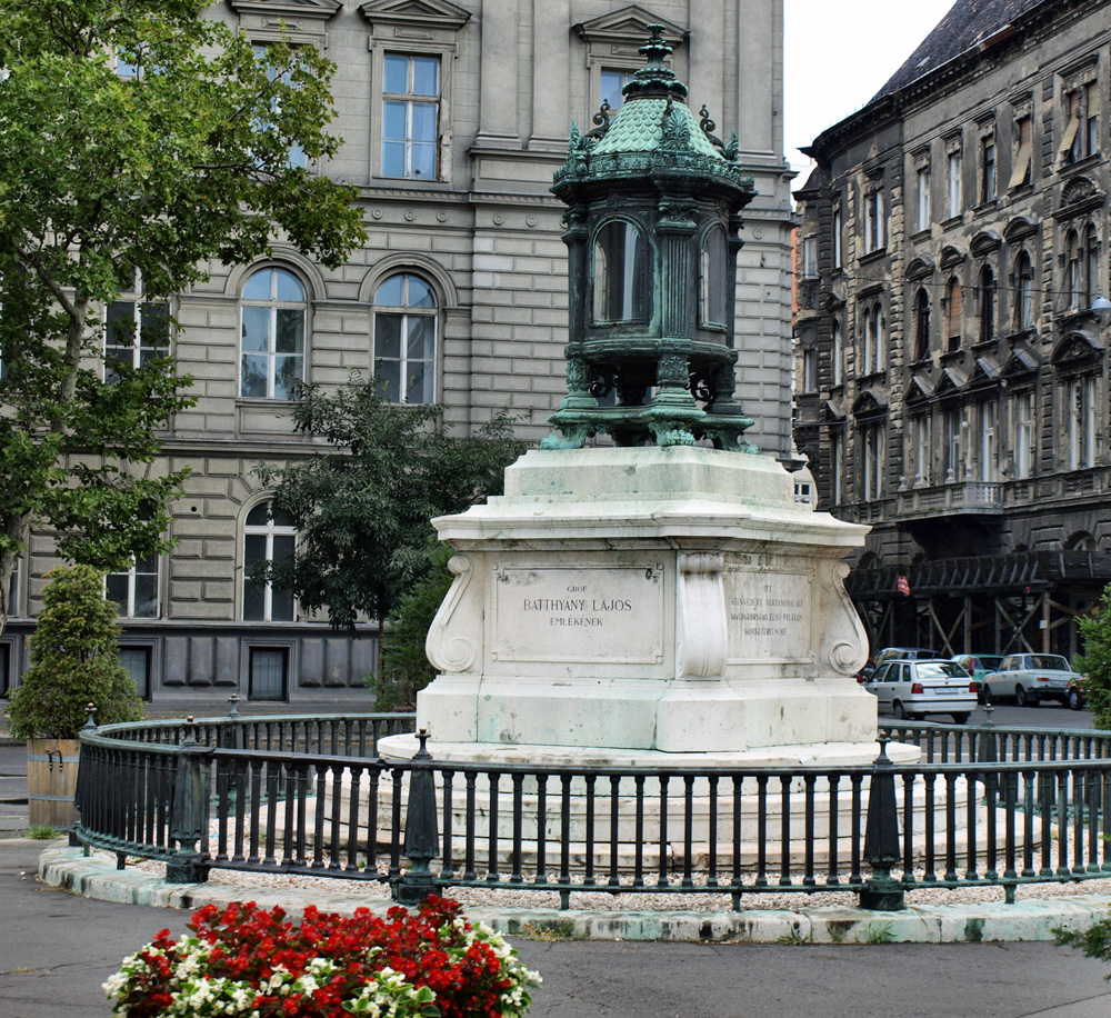 Batthyány örökmécses, Budapest, V. ker., Báthory utca, Hold utca kereszteződésénél. Készült Pogány Móric építész tervei alapján 1926-ban